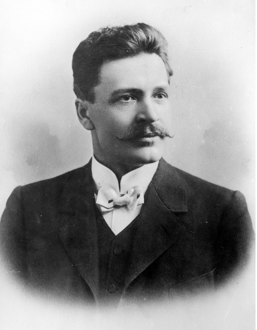 Ignacy Mościcki (1867-1946) - President of Poland 1926-1939